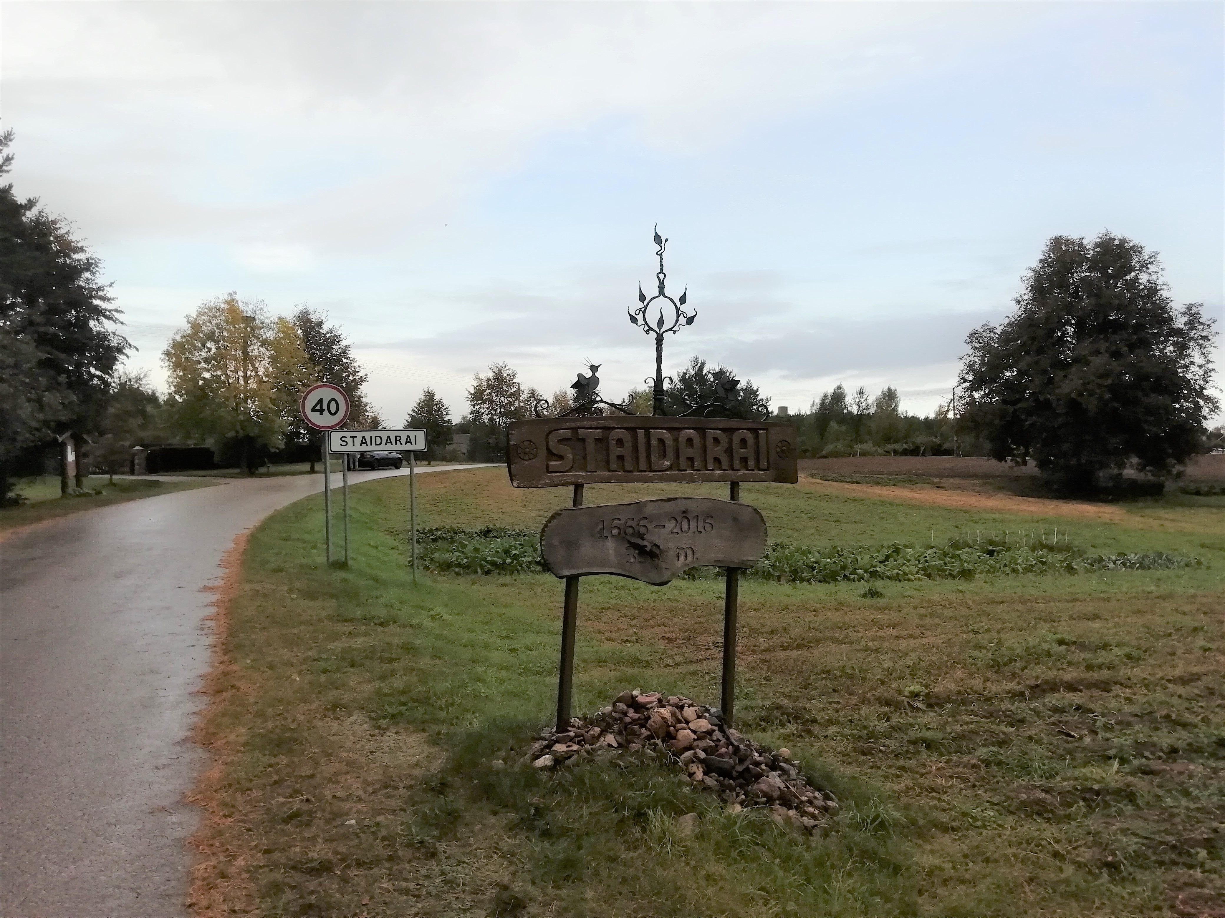 Tablice z nazwą miejscowości. Wjazd do Staidarai (Stejderyszki) od strony Łoździej, wrzesień 2019